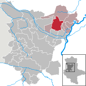 Colbitz in Saxony-Anhalt (Country) - District (Landkreis) Börde